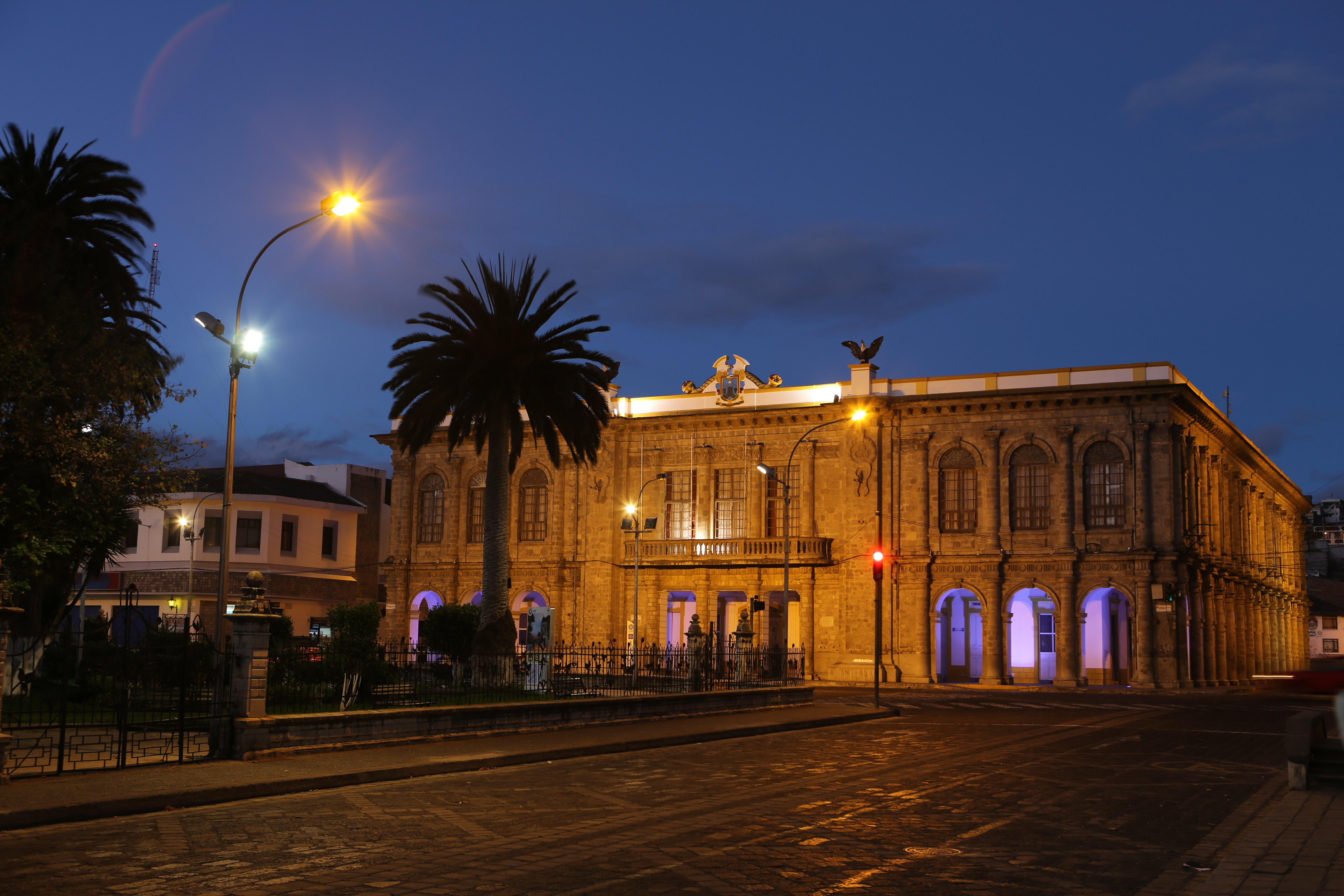 Latacunga City Hall (Municipio)